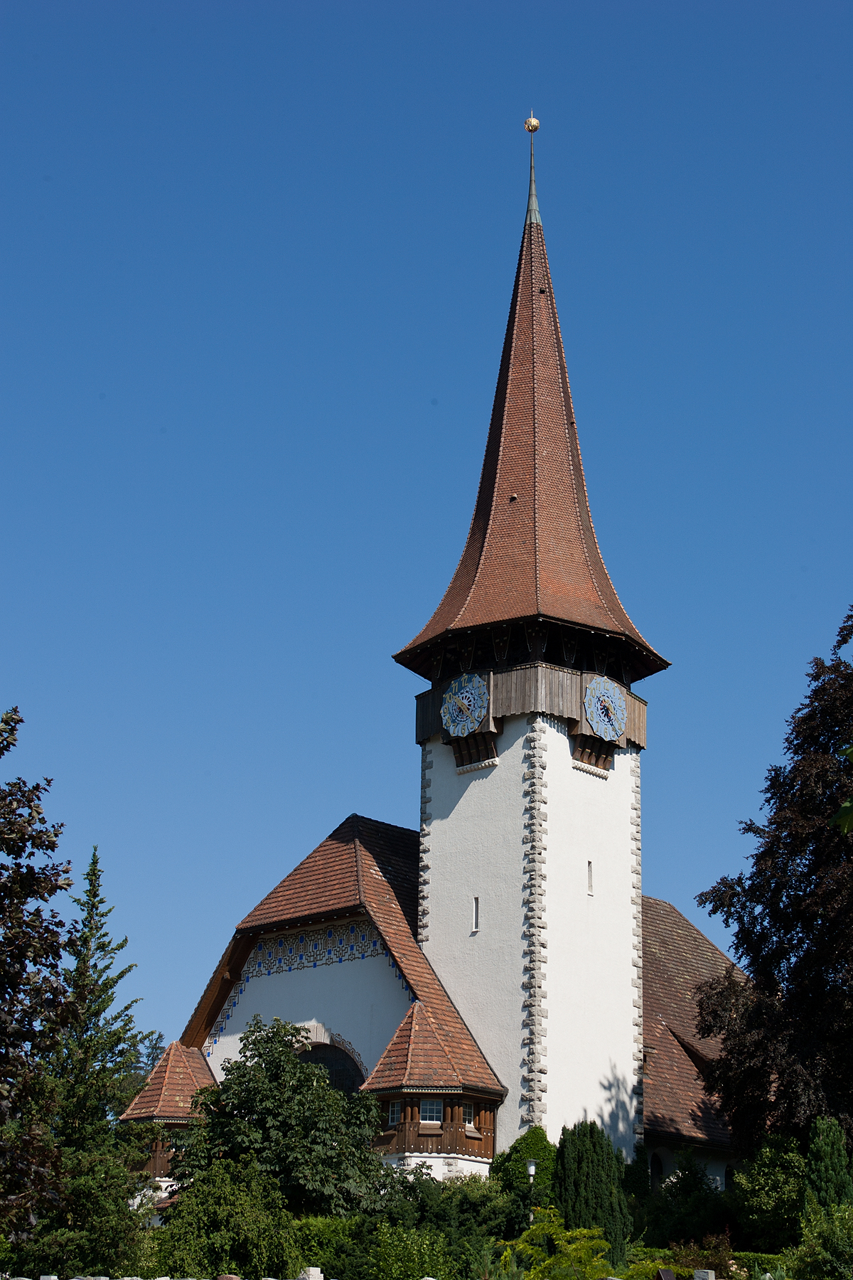 Reformierte Kirche in Spiez (BE)